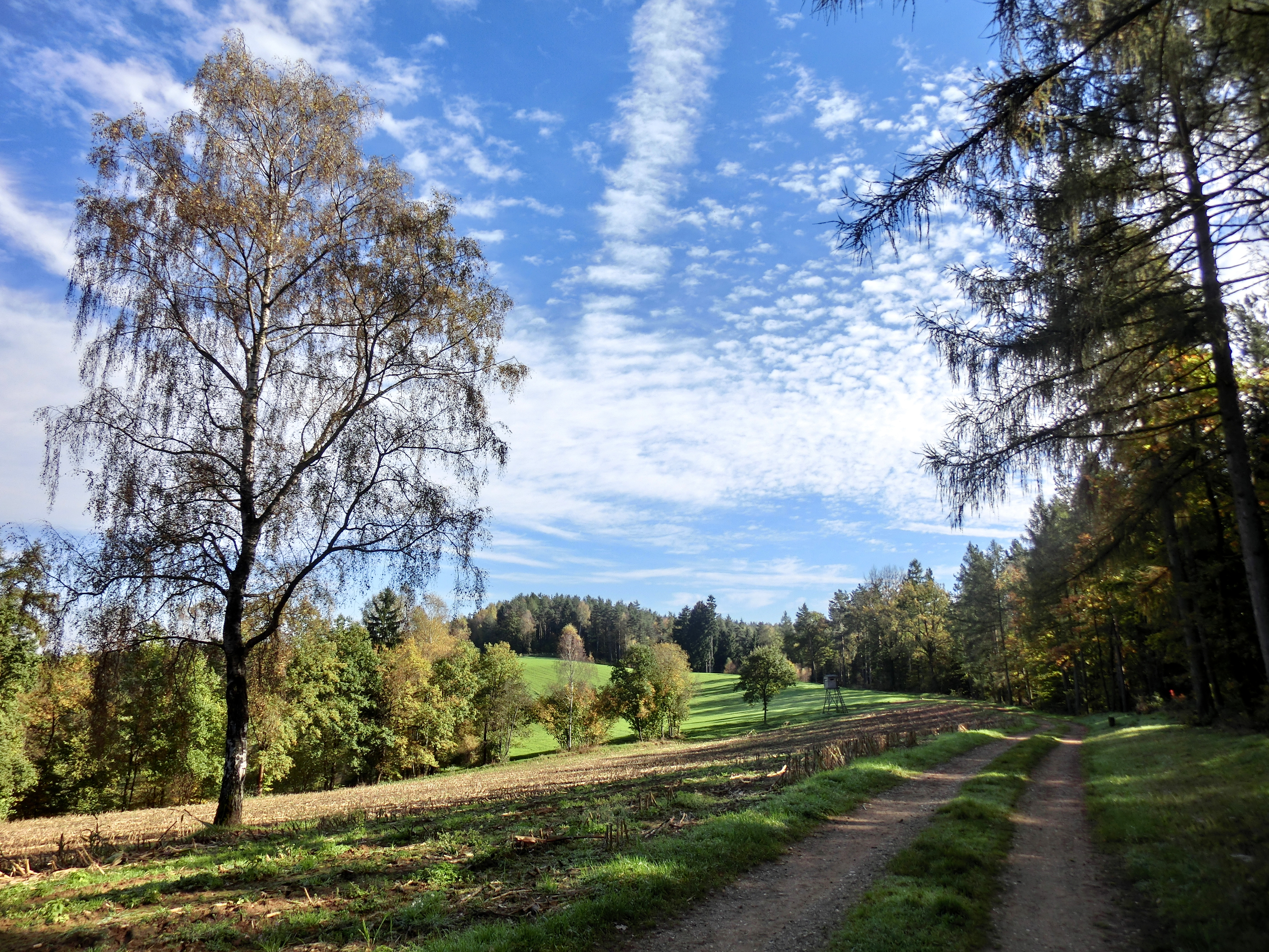 Via Imperialis 1